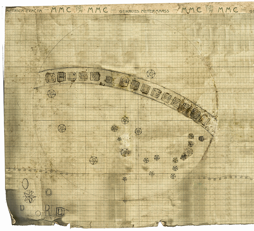 Esboço da Bandeira Nacional feito em papel quadriculado, datado novembro de 1889, autoria do engenheiro Raimundo Teixeira Mendes. Material descoberto na Igreja Positivista do Brasil, no Rio de Janeiro.